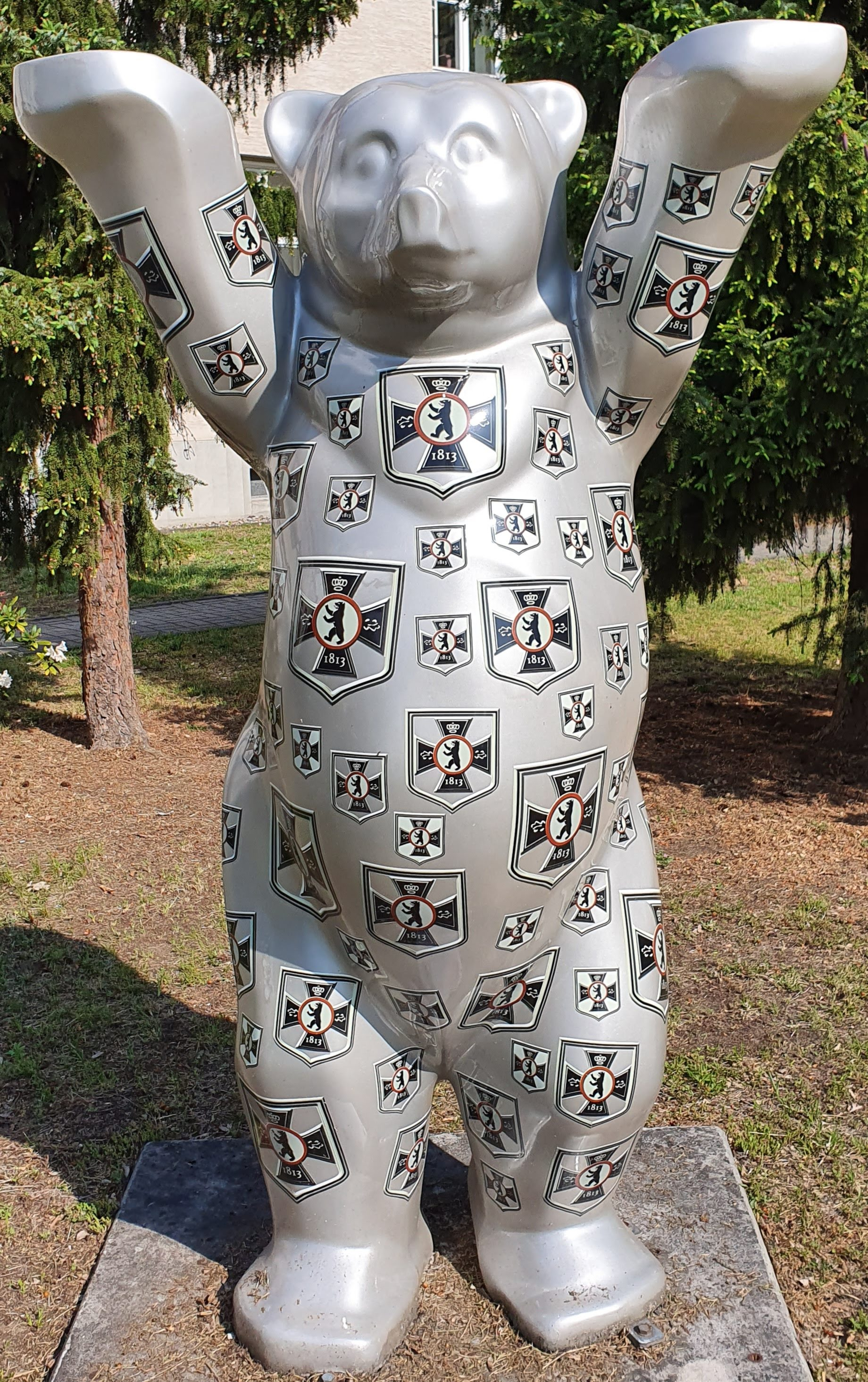 Der Buddy Bär des ehemaligen Standortskommandos Berlin in der Julius-Leber-Kaserne, Kurt-Schumacher-Damm 41, Berlin-Wedding, Deutschland